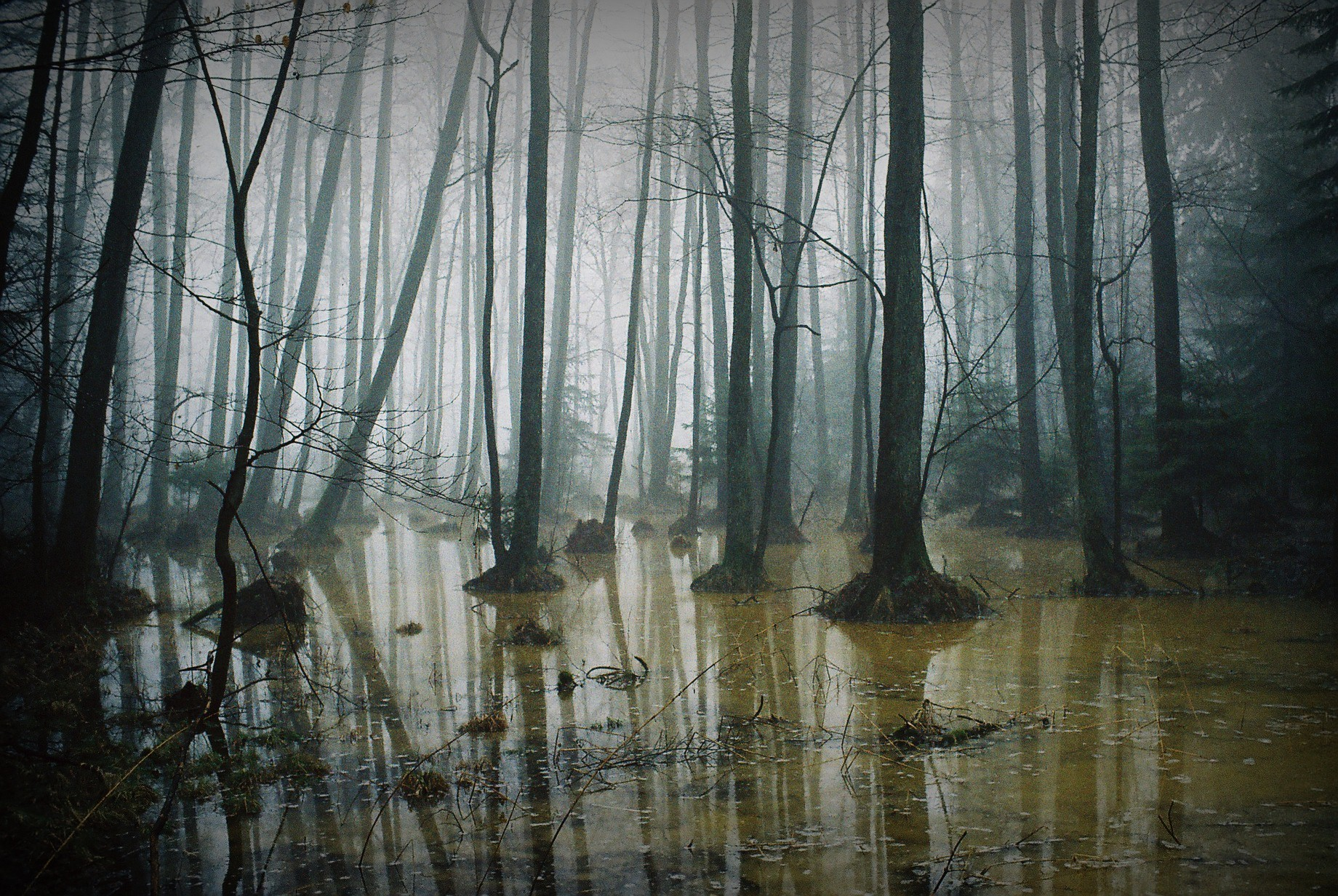 Autor: Adrian Grzegorz Rok utworzenia: 2002